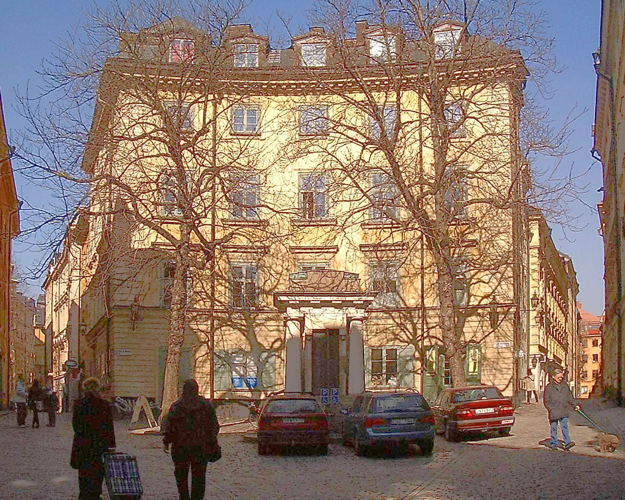 Tyska Brunnsplan, Gamla stan, Stockholm. Light and perspective modified.